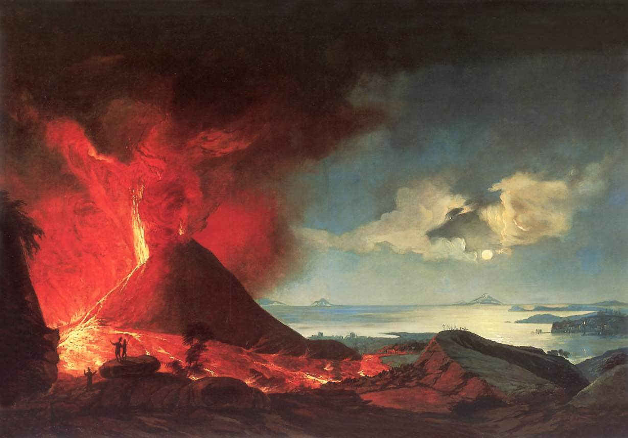 Vulkánkitörés